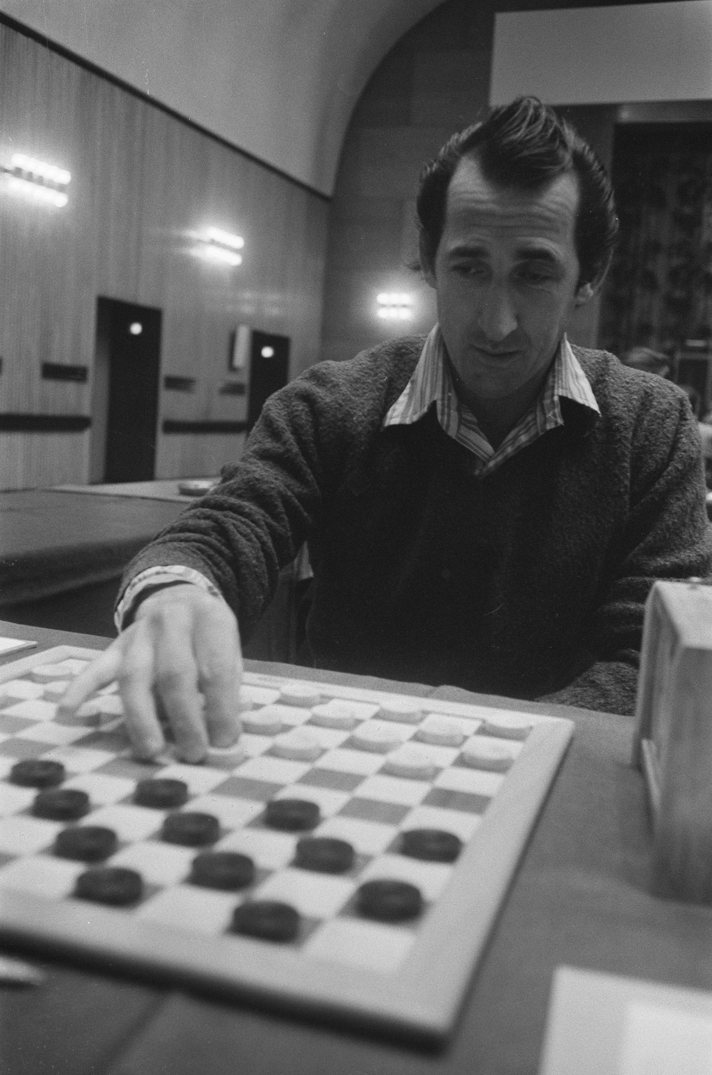 Collectie / Archief : Fotocollectie Anefo Reportage / Serie : Suiker Damtoernooi in Amsterdam Beschrijving : Georges Mostovoy achter het dambord Datum : 18 december 1973 Locatie : Amsterdam, Noord-Holland Trefwoorden : dammen, damspelers, damtoernooien Persoonsnaam : Mostovoy, Georges Fotograaf : Fotograaf Onbekend / Anefo Auteursrechthebbende : Nationaal Archief Materiaalsoort : Negatief (zwart/wit) Nummer archiefinventaris : bekijk toegang 2.24.01.05 Bestanddeelnummer : 926-8940